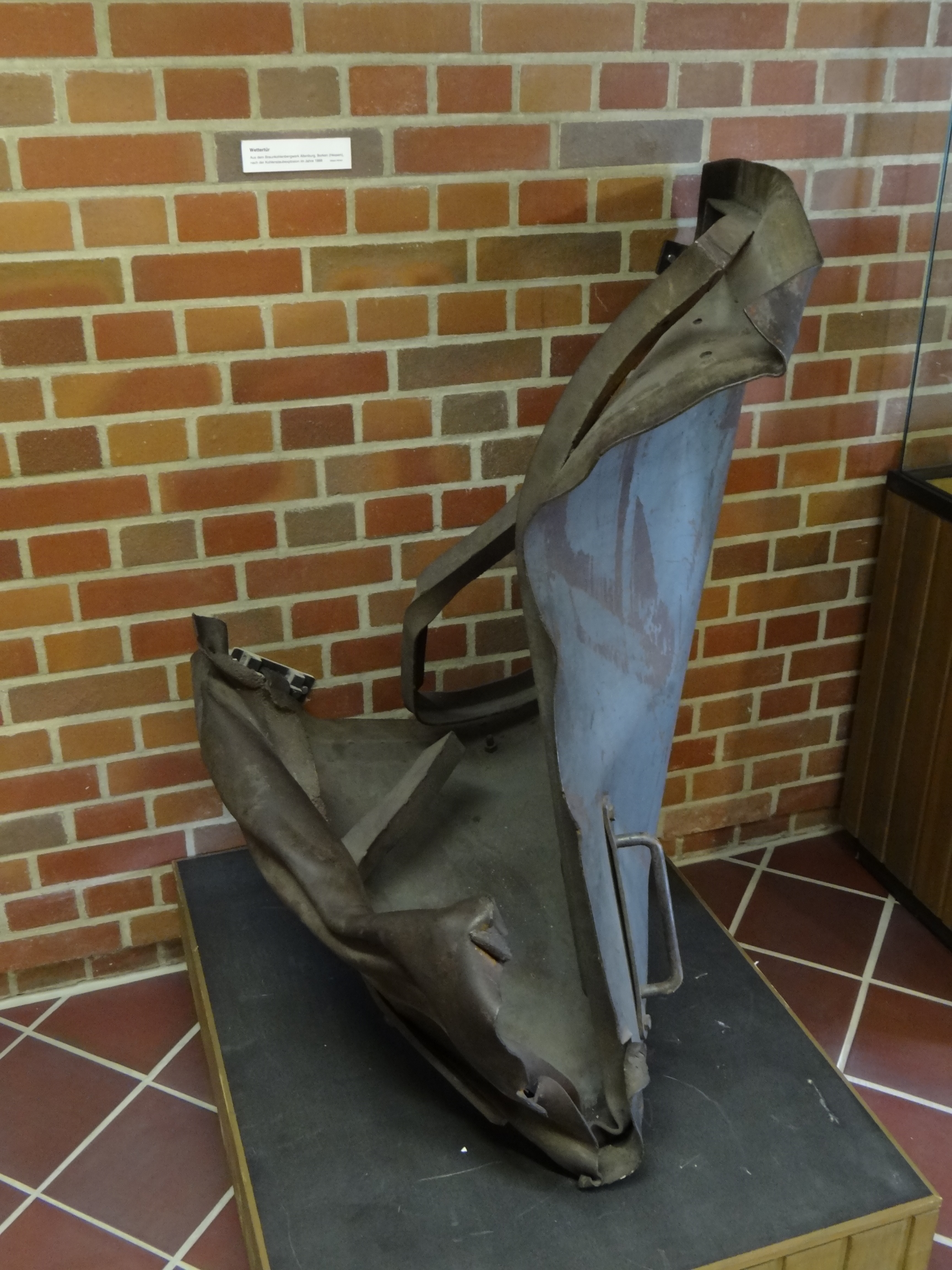 Durch Kohlenstaubexplosion 1988 in der Grube Altenburg (Borkener Revier) zerstörte Wettertür. Exponat im Deutschen Bergbau-Museum, Bochum